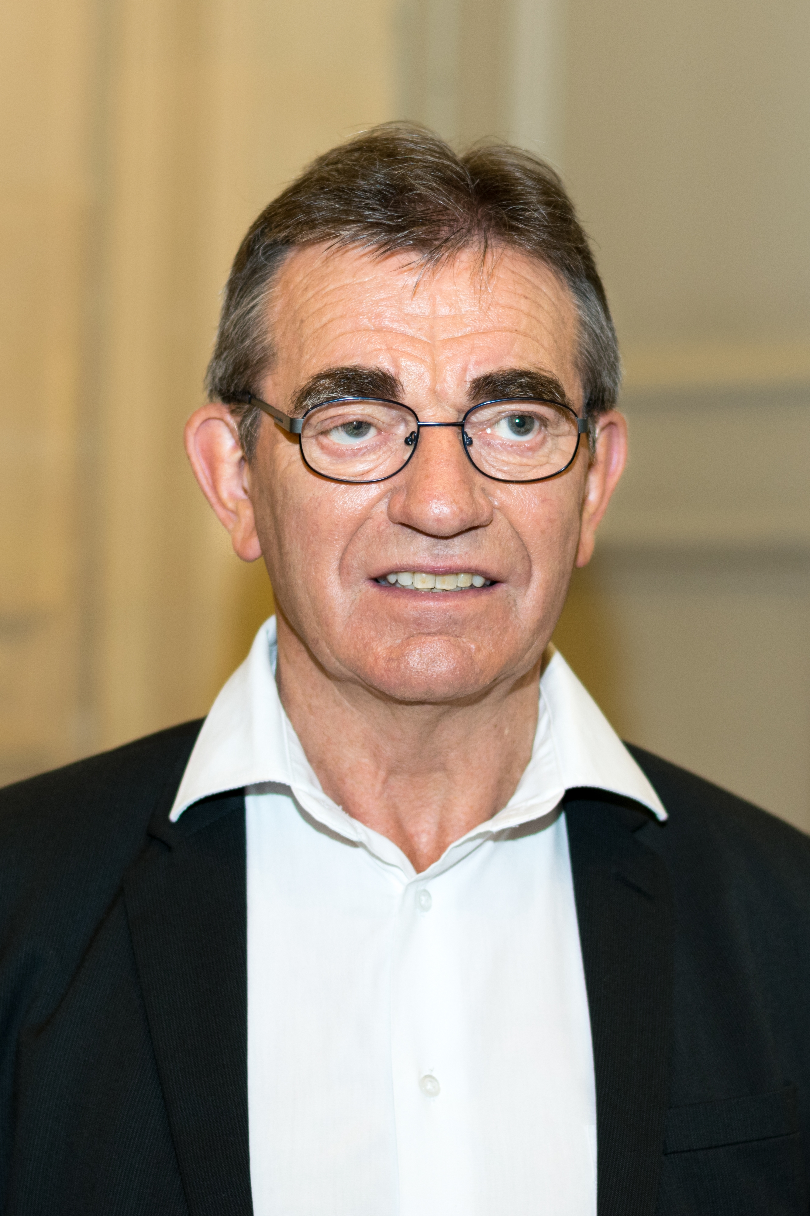 Yves Daniel dans la salle des Quatres Colonnes du Palais Bourbon durant la première semaine parlementaire de la XVe législature de la Cinquième République française (Paris, France).